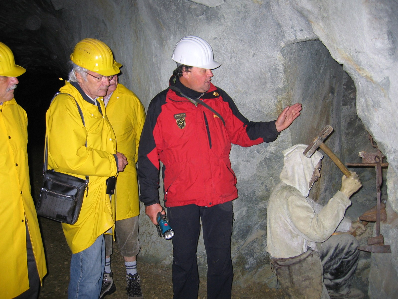 Museo miniere Predoi